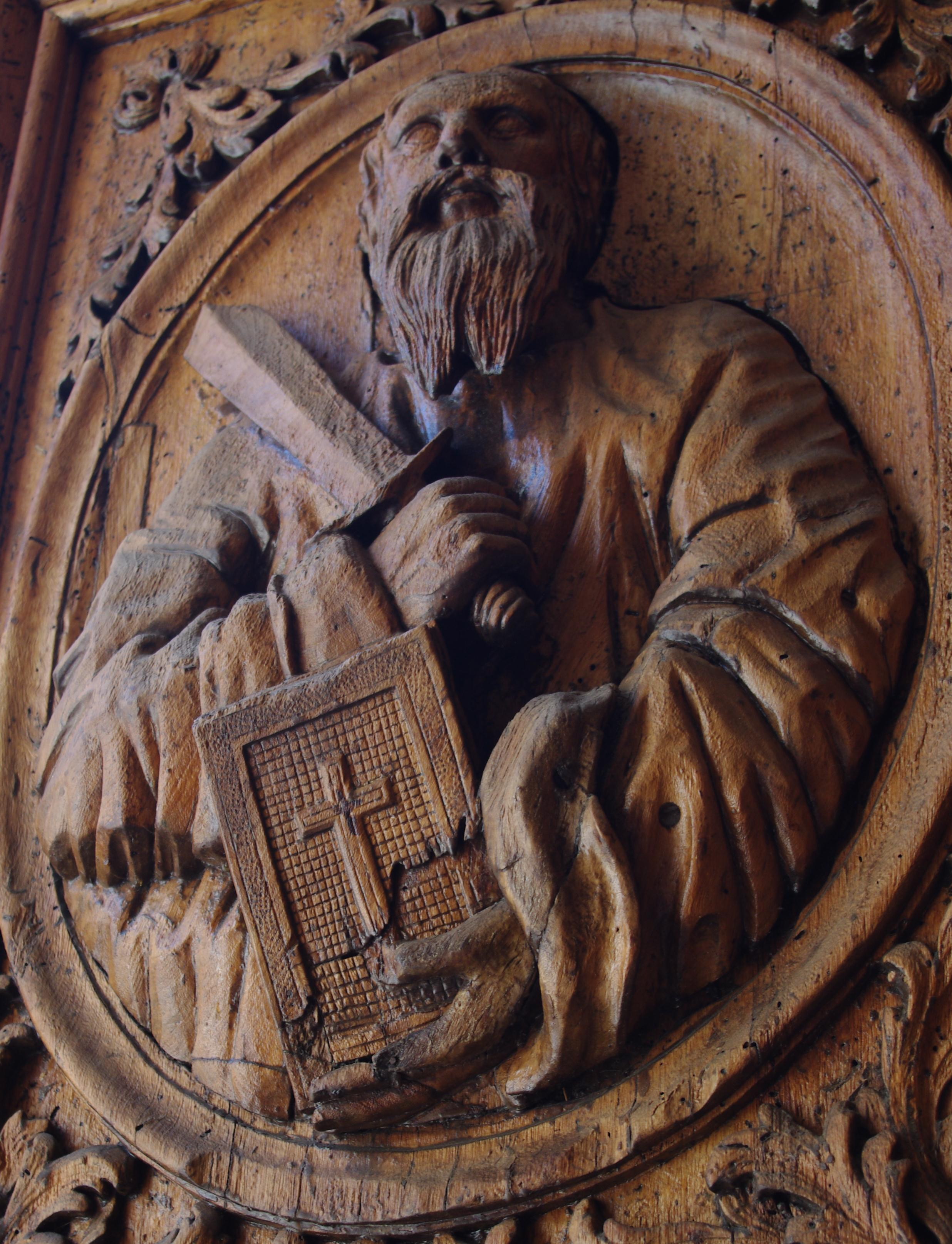 Saint Sauveur sculpture sur bois, brignoles (Var)